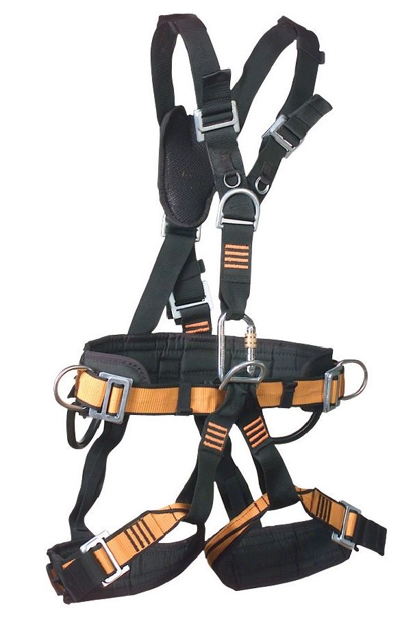 Questa foto è stata concessa in uso da Kong per Wikipedia. l'autore non conoscendo i termini della licenza CC a affidato al sottoscritto di fare "come meglio credi"